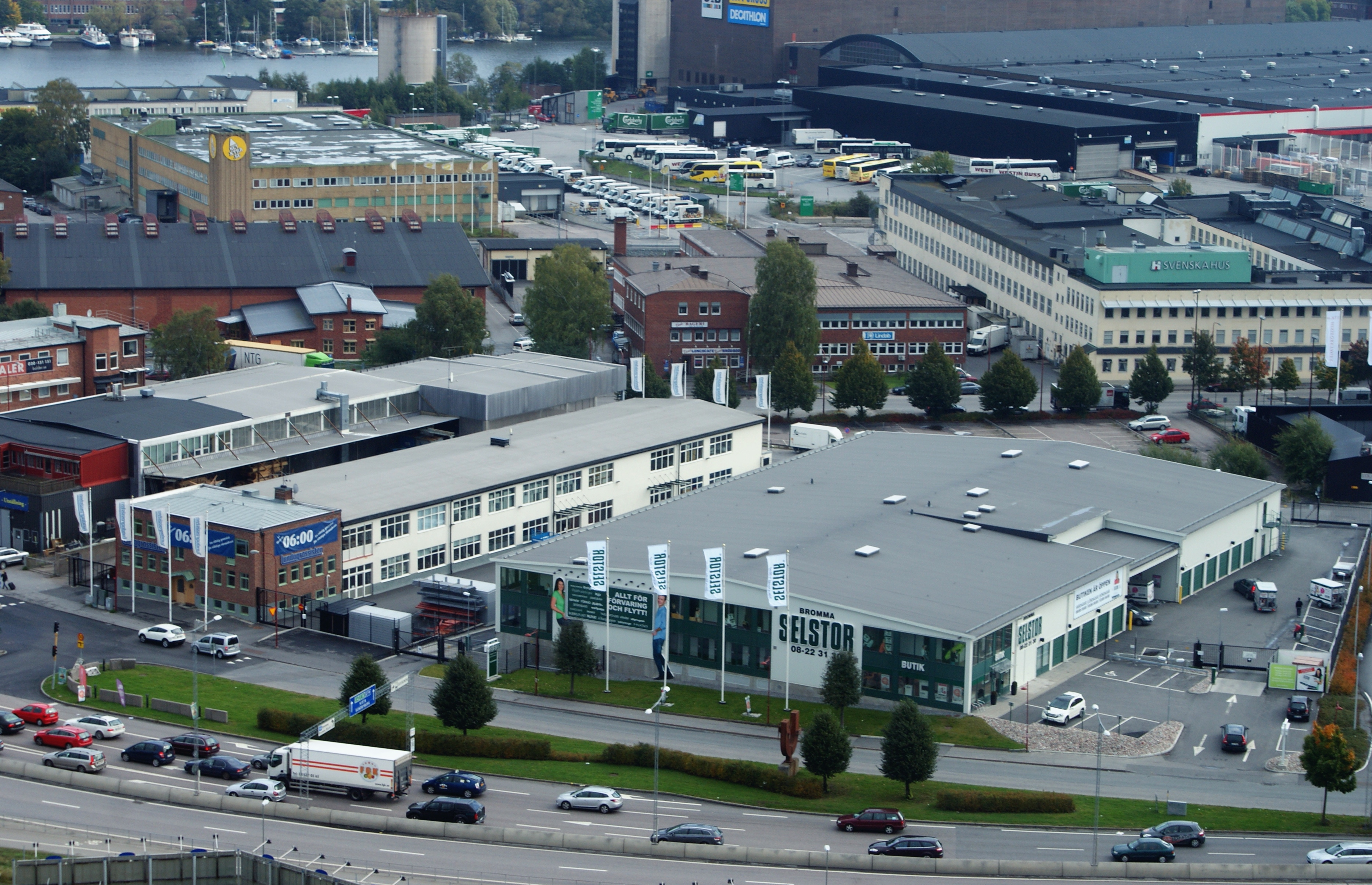 Ulvsunda industriområde